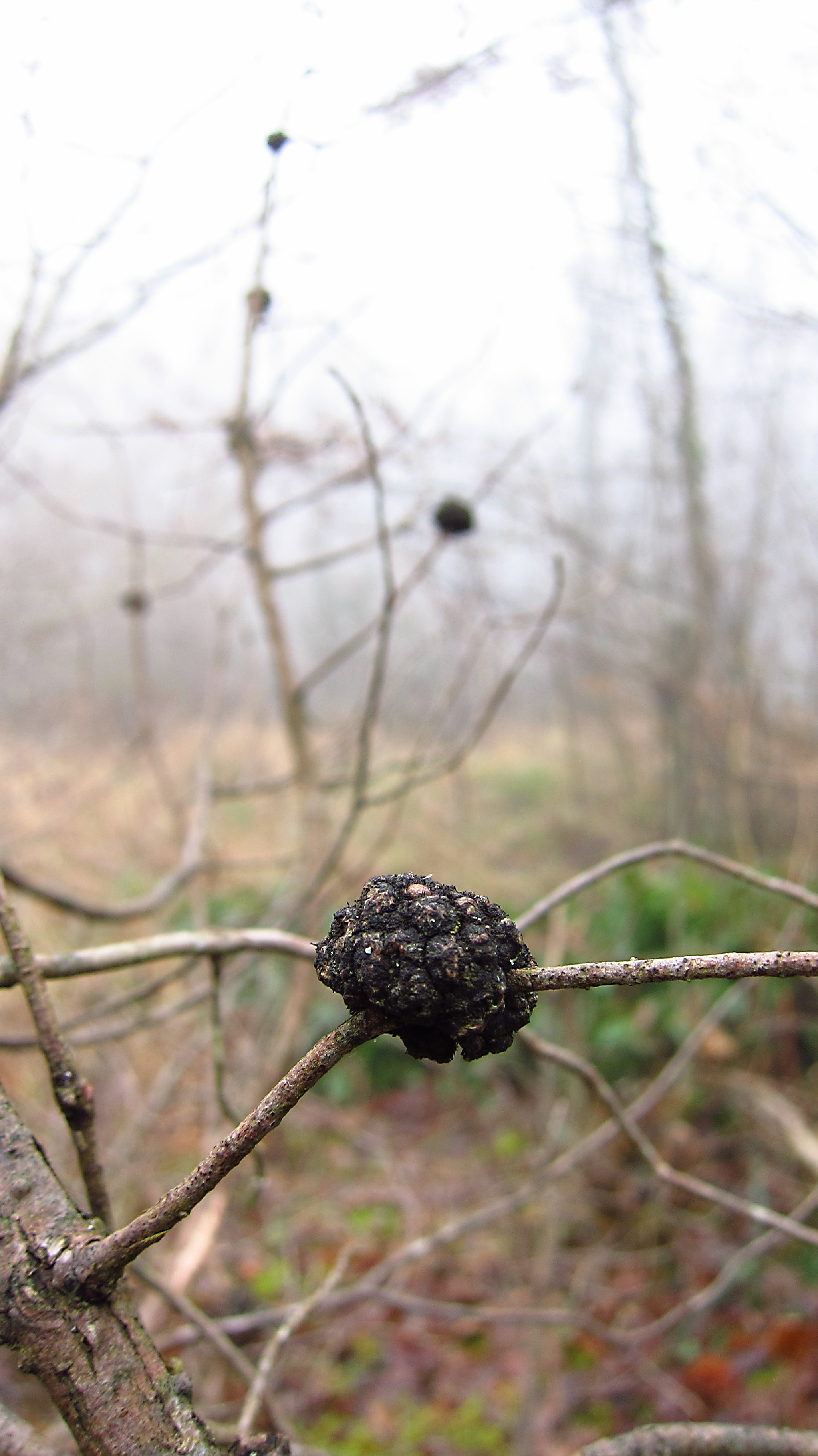 Saint-Girons (Ariège, Midi-Pyrénées, France) : Tumeurs sur un genévrier (Juniperus communis).